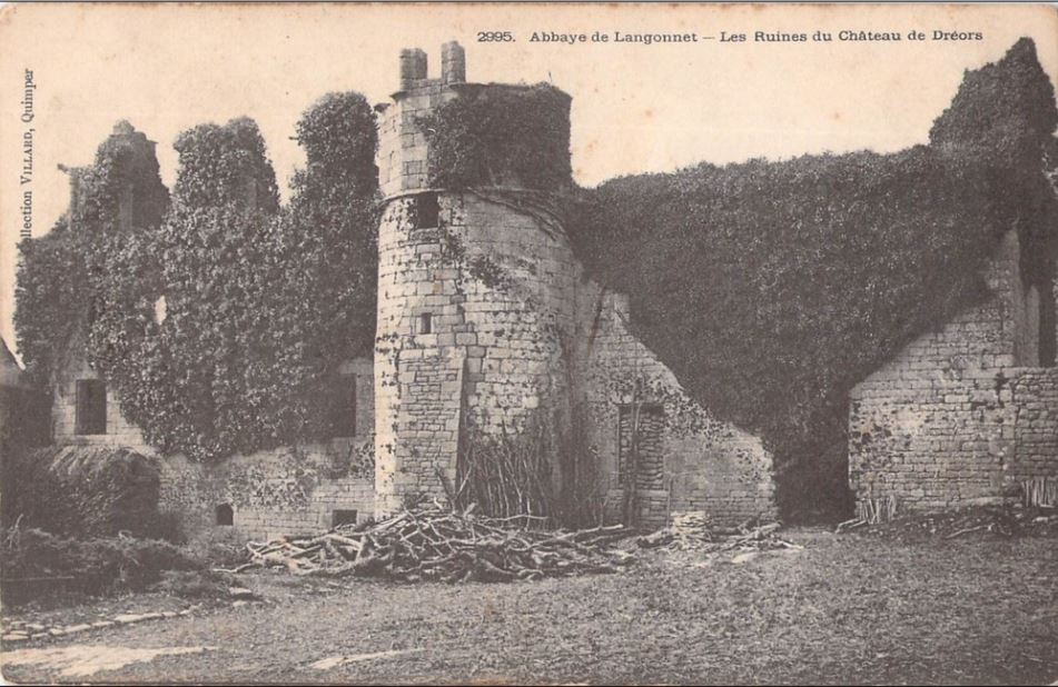 Priziac (département du Morbihan), les ruines du château de Dréors vers 1900